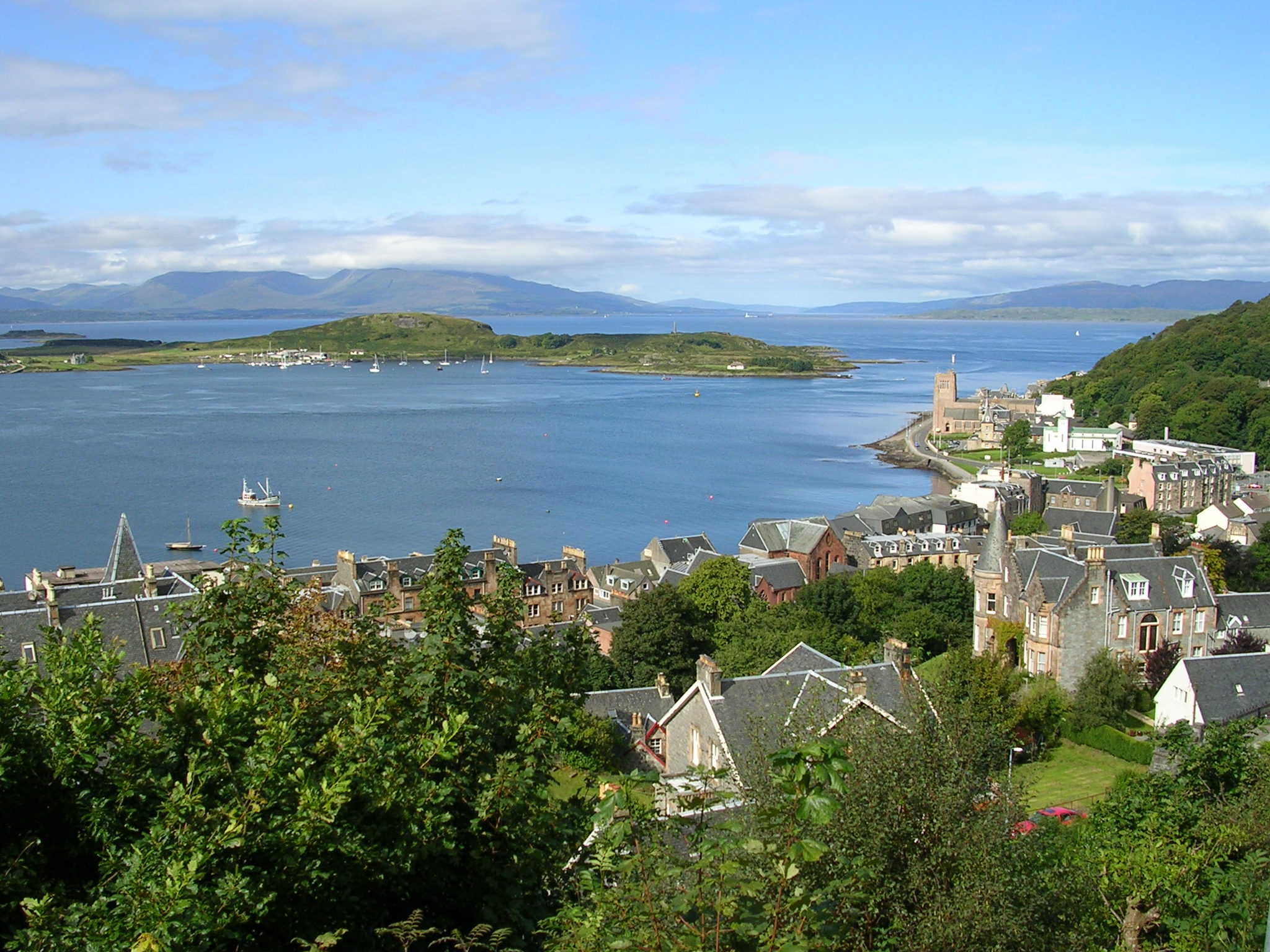 Vista de la ciudad escocesa de Obán